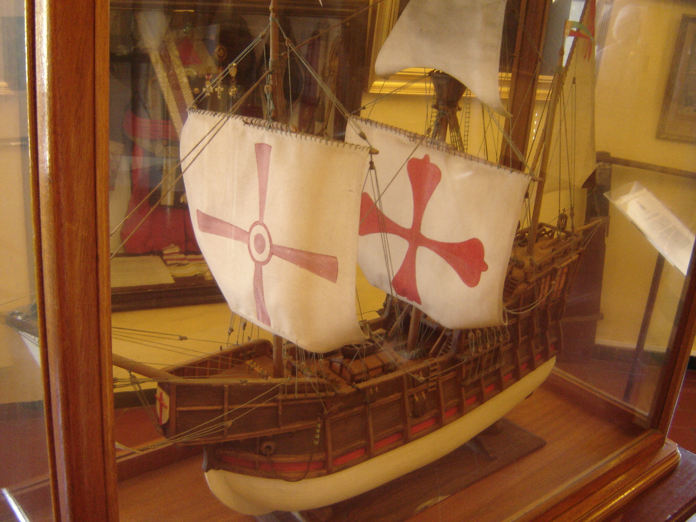 Podría ser "La Niña" (Museo Naval, Sevilla, España).